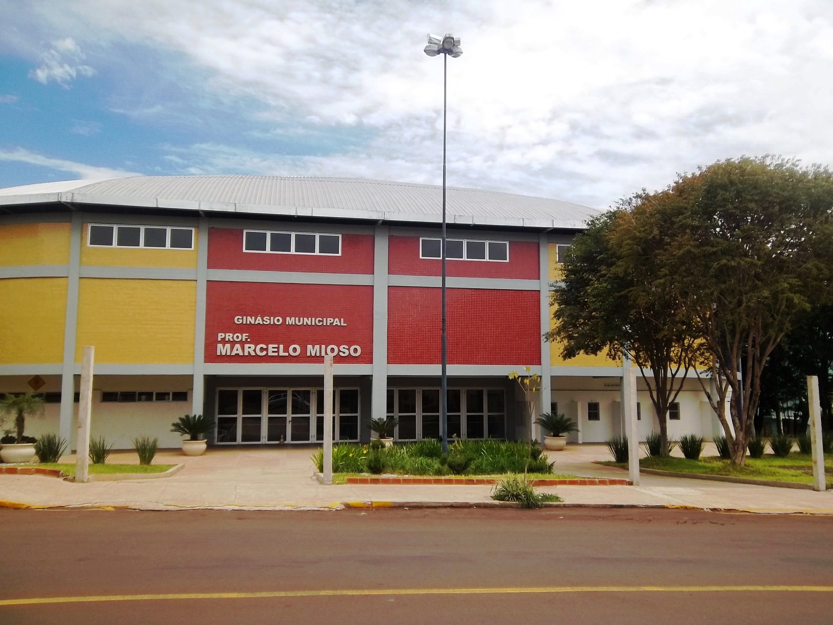 Vista frontal do Ginásio Municipal Professor Marcelo Mioso, localizado no município brasileiro de Santo Ângelo, Rio Grande do Sul.